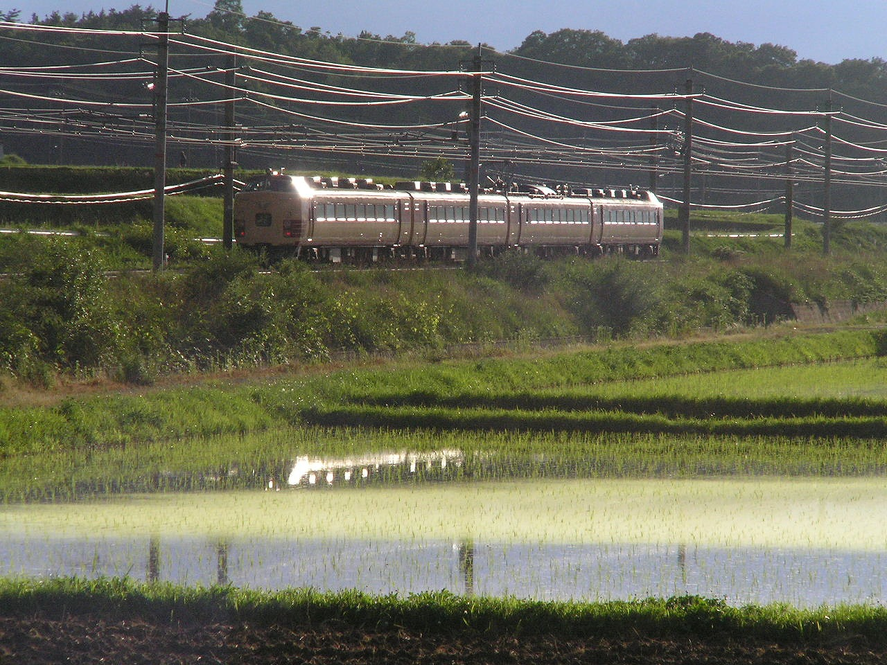 福知山線新三田ー広野間